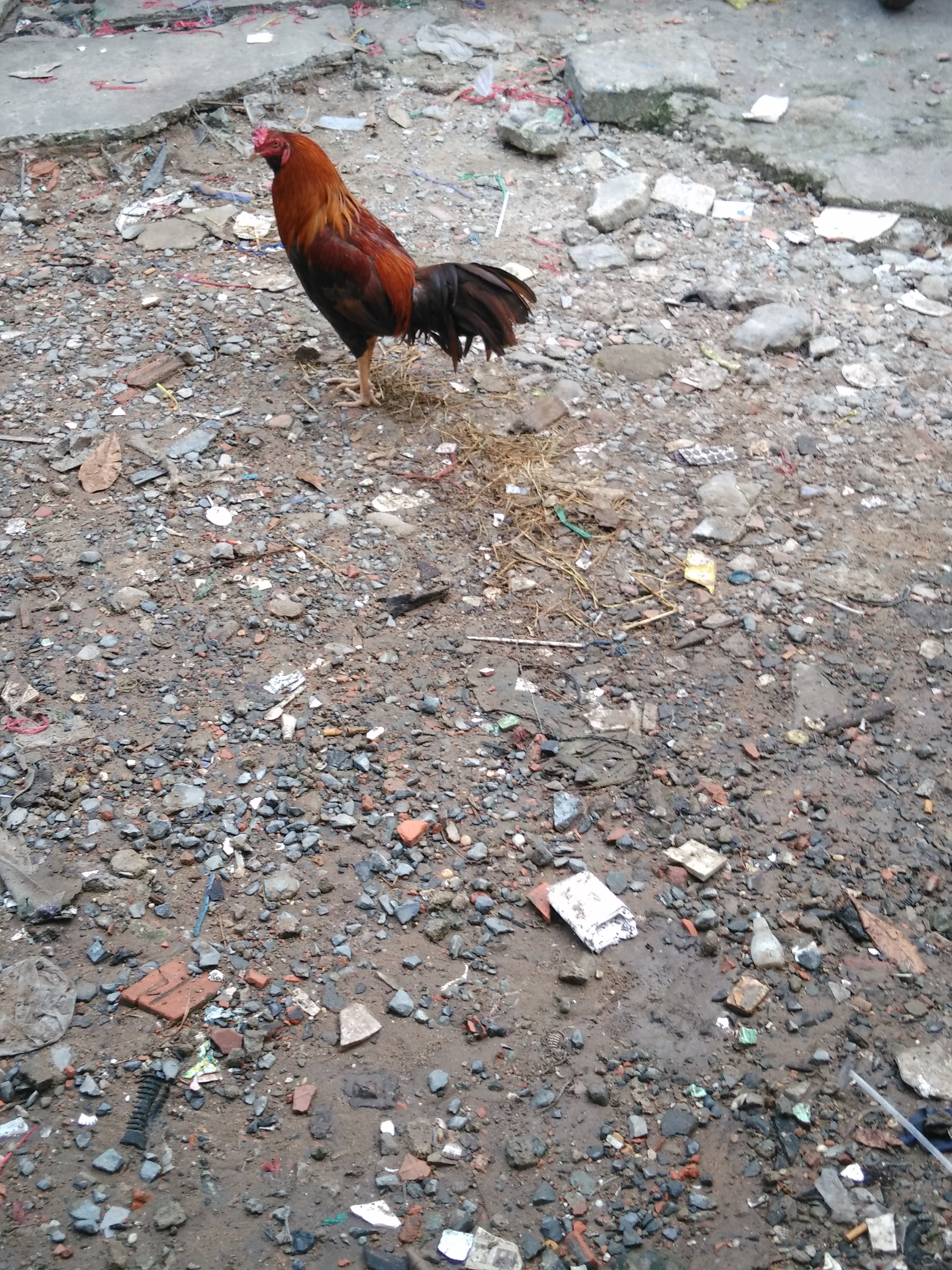 Hình tự chụp bằng máy di động cá nhân về một con gà chọi Cao Lãnh